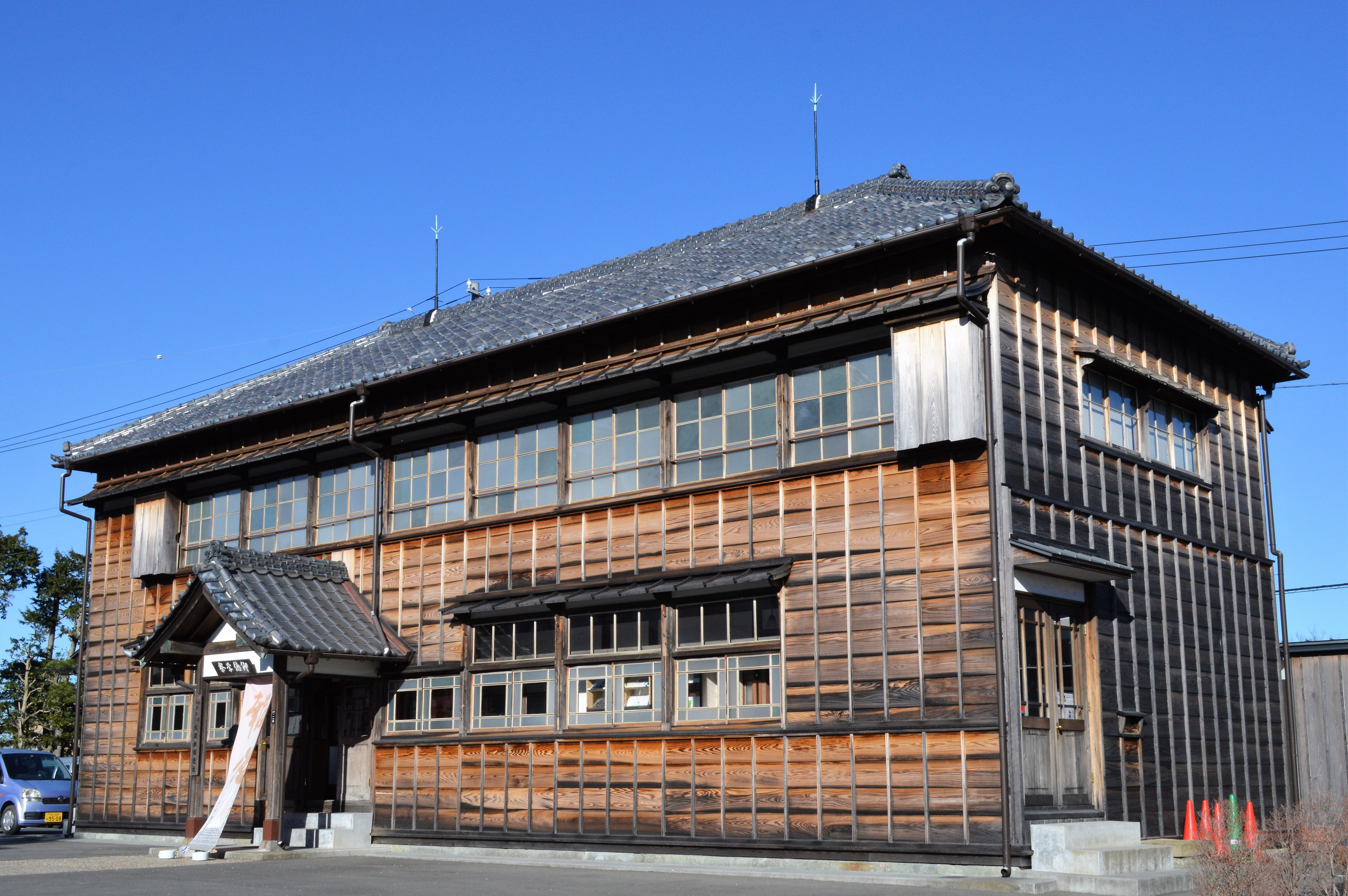 大日本報徳社仰徳学寮。